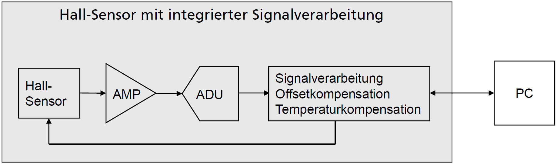 Blockschaltbild eines Hall-Sensor-ICs mit integriertem Verstärker, Analog-Digital-Umsetzer und Signalverarbeitung.